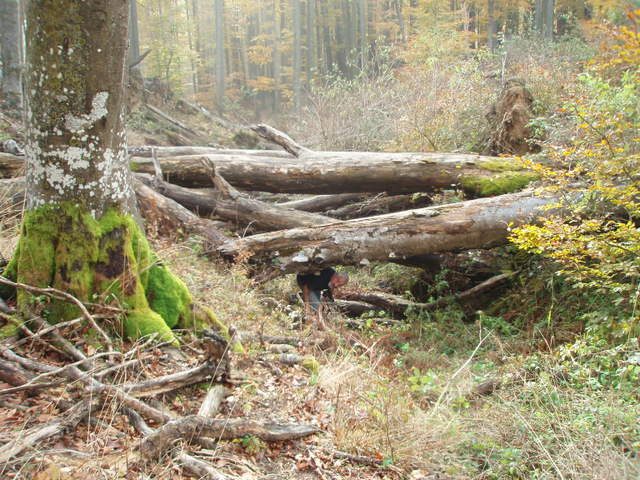 Ja sam autor ove fotografije.